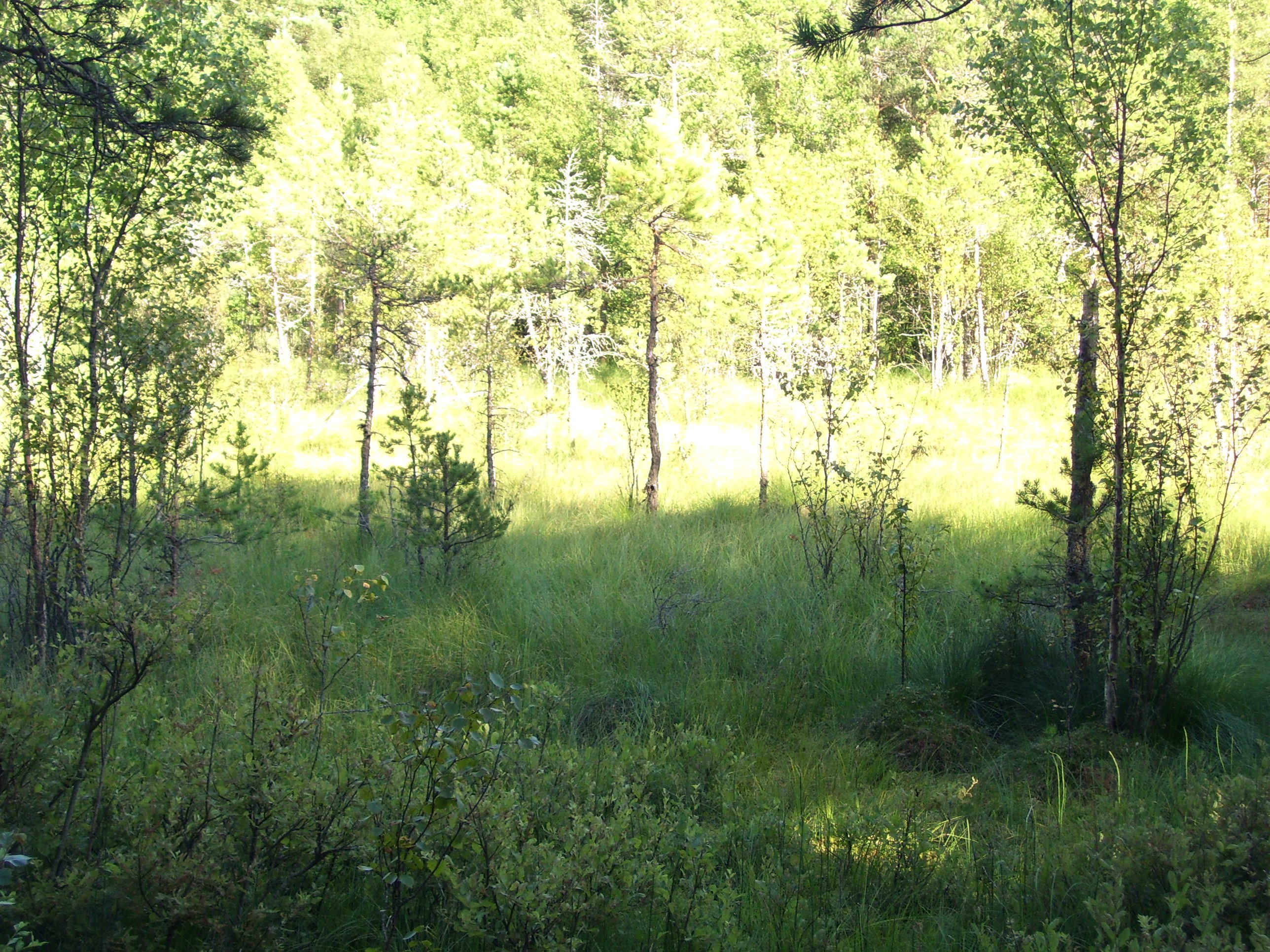 Soo Mädajärve orus (Pudisoo küla, Kuusalu vald)